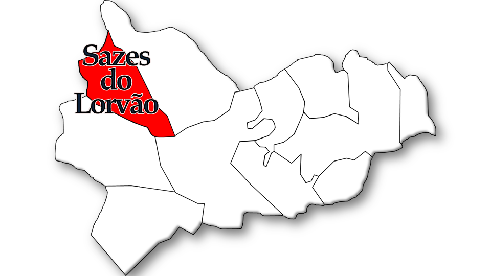 População